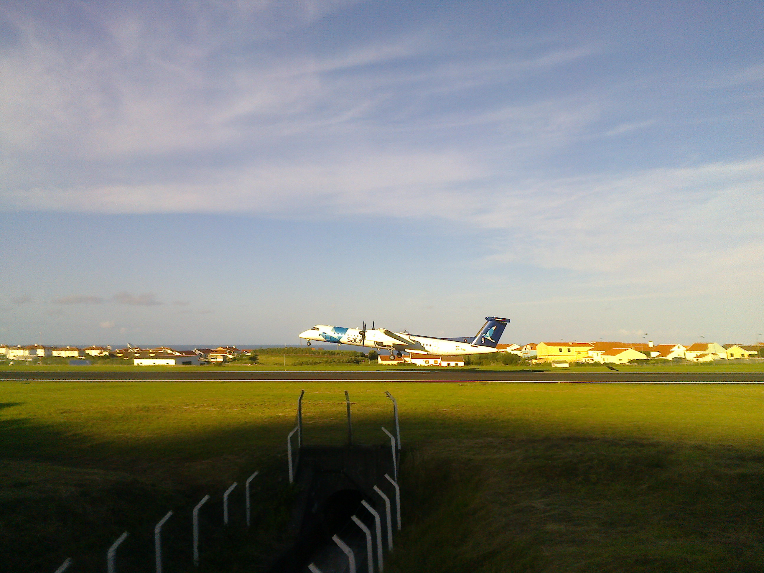 SATA Dash Q400 - Take-off at Flores Airport.